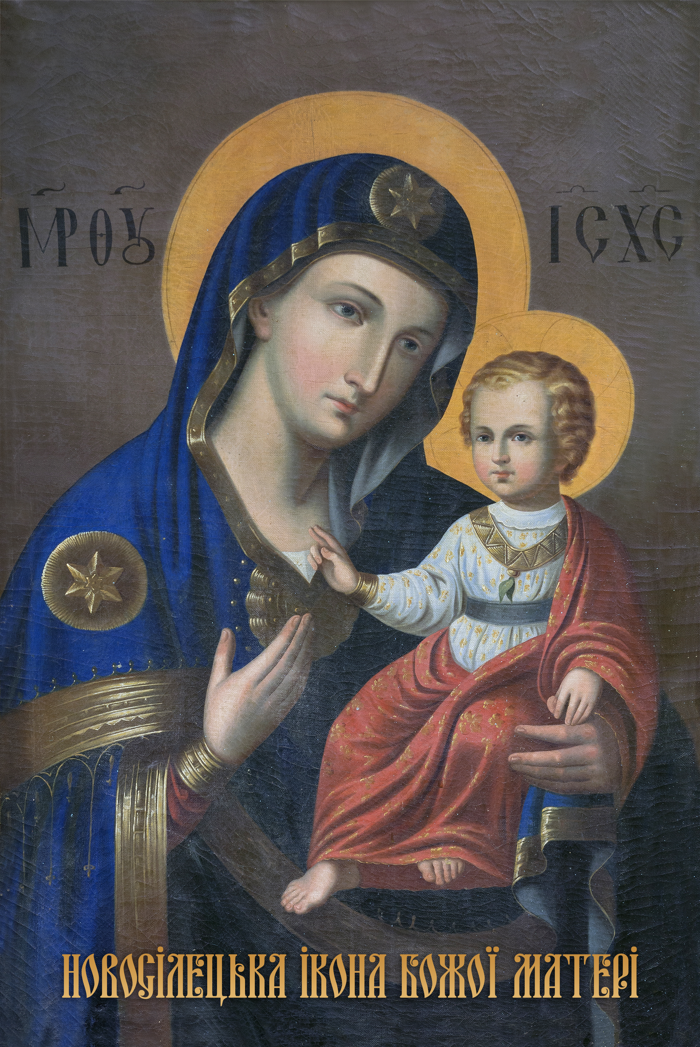 Новосілецька Ікона Божої Матері. Головна Запрестольна Ікона. Знаходиться в Храмі Положення Ризи Пресвятої Богородиці. с. Новосілка